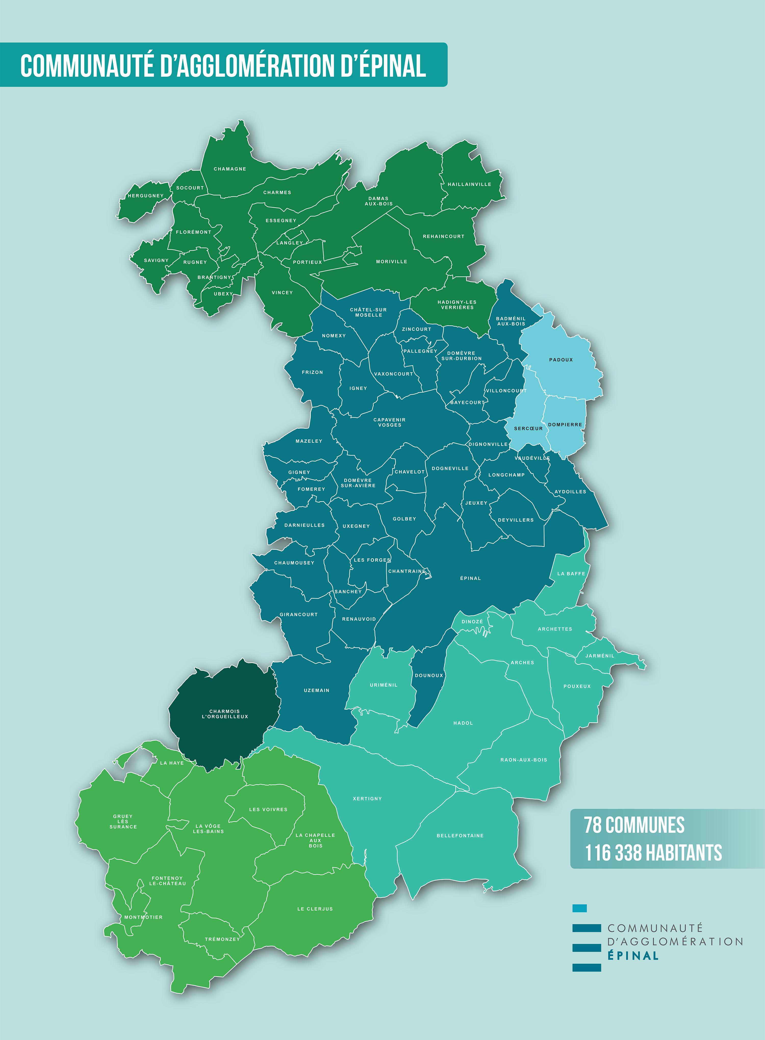 Communes membres de la Communauté d'Agglomération d'Epinal au 1er janvier 2018